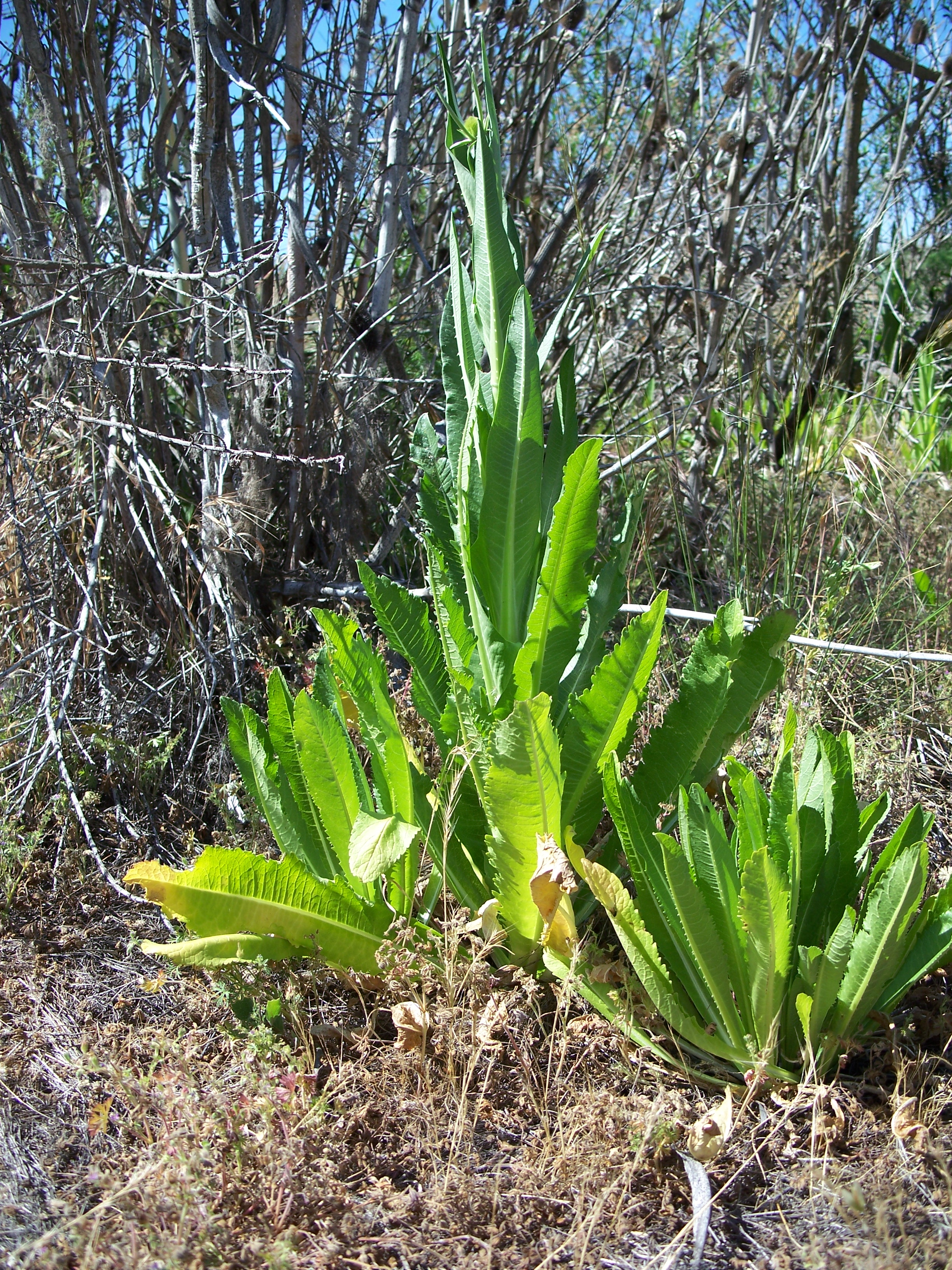 Dipsacus sativus Made in San Jose, California. Identified by Franz Xaver.